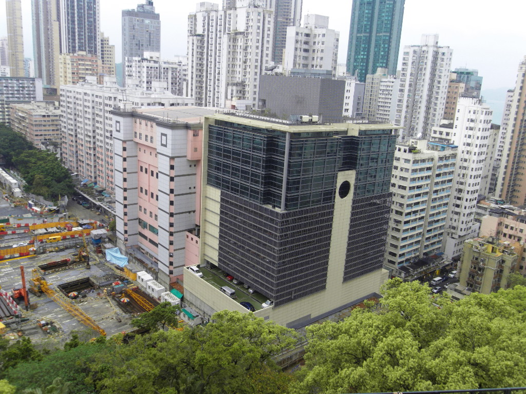 中文（香港）: 士美非路市政大廈, 堅尼地城, 香港